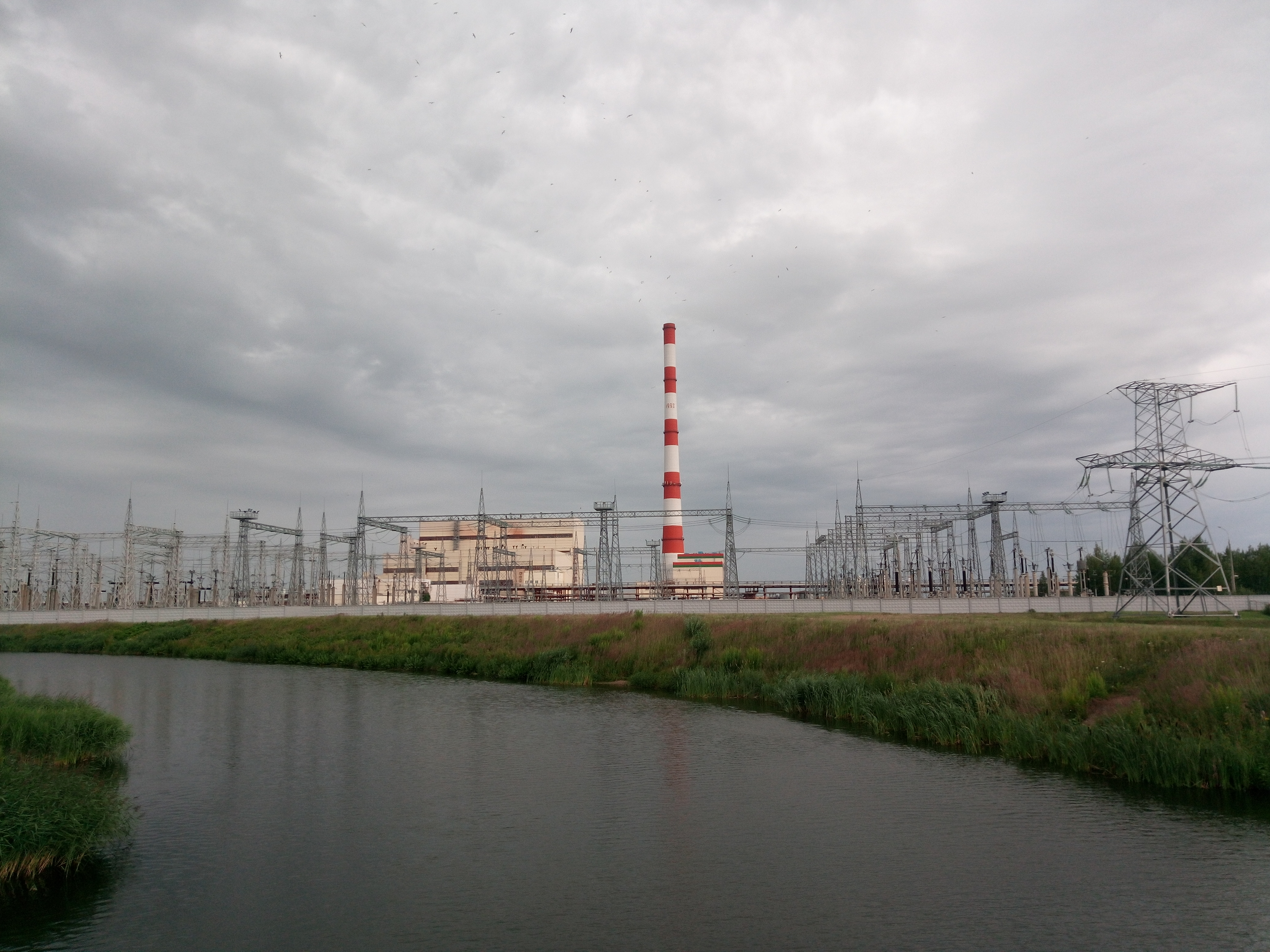 Мінская ЦЭЦ-5 і канал з в. Земснарад